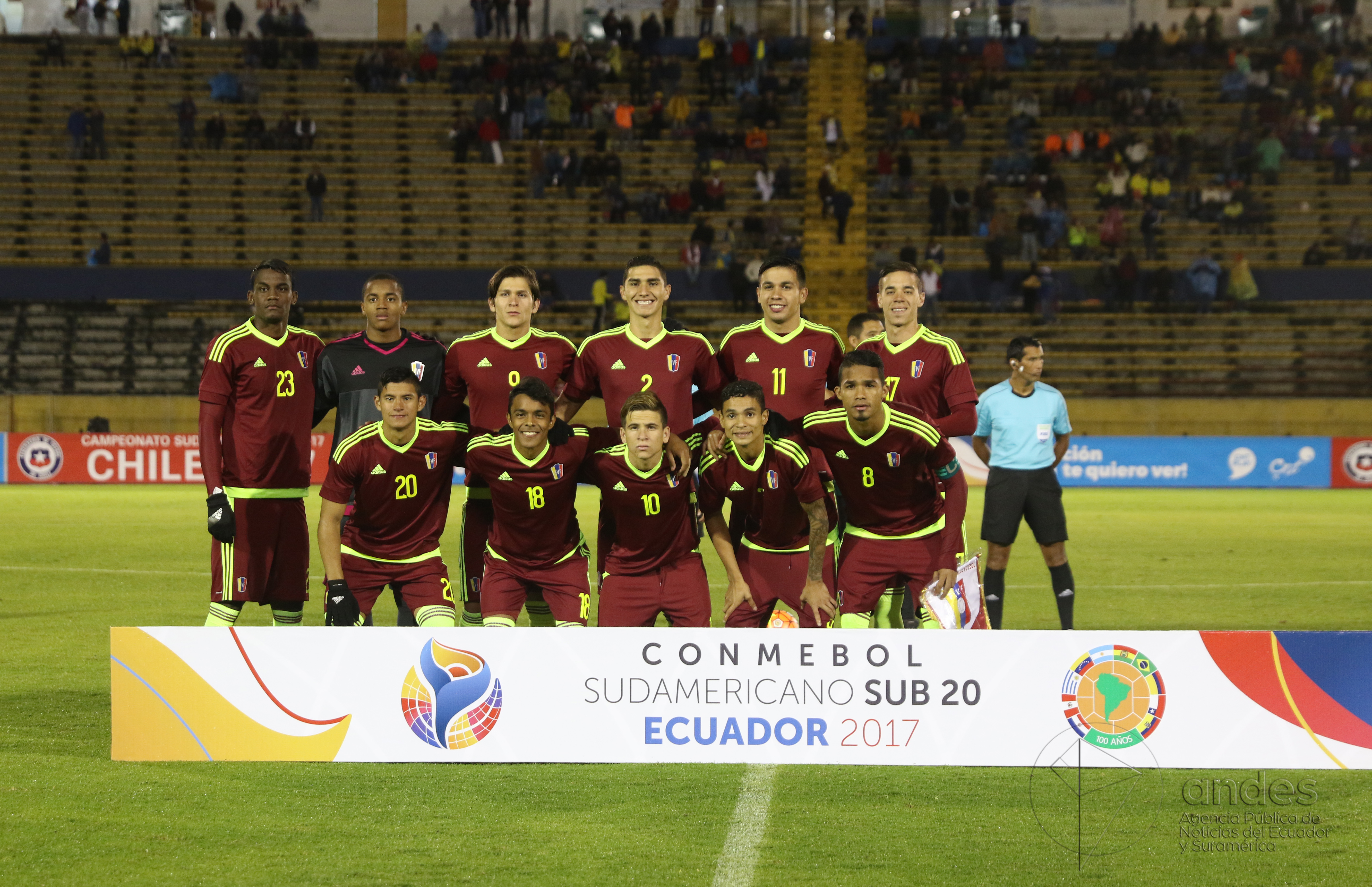 Quito, 2 feb (Andes).- La selección juvenil de Venezuela goleó 4-2 este jueves a su par de Ecuador, que comprometió seriamente sus opciones de clasificar al Campeonato Mundial Sub 20 Corea del Sur 2017, que se desarrollará en mayo próximo. ANDES/Micaela Ayala V.